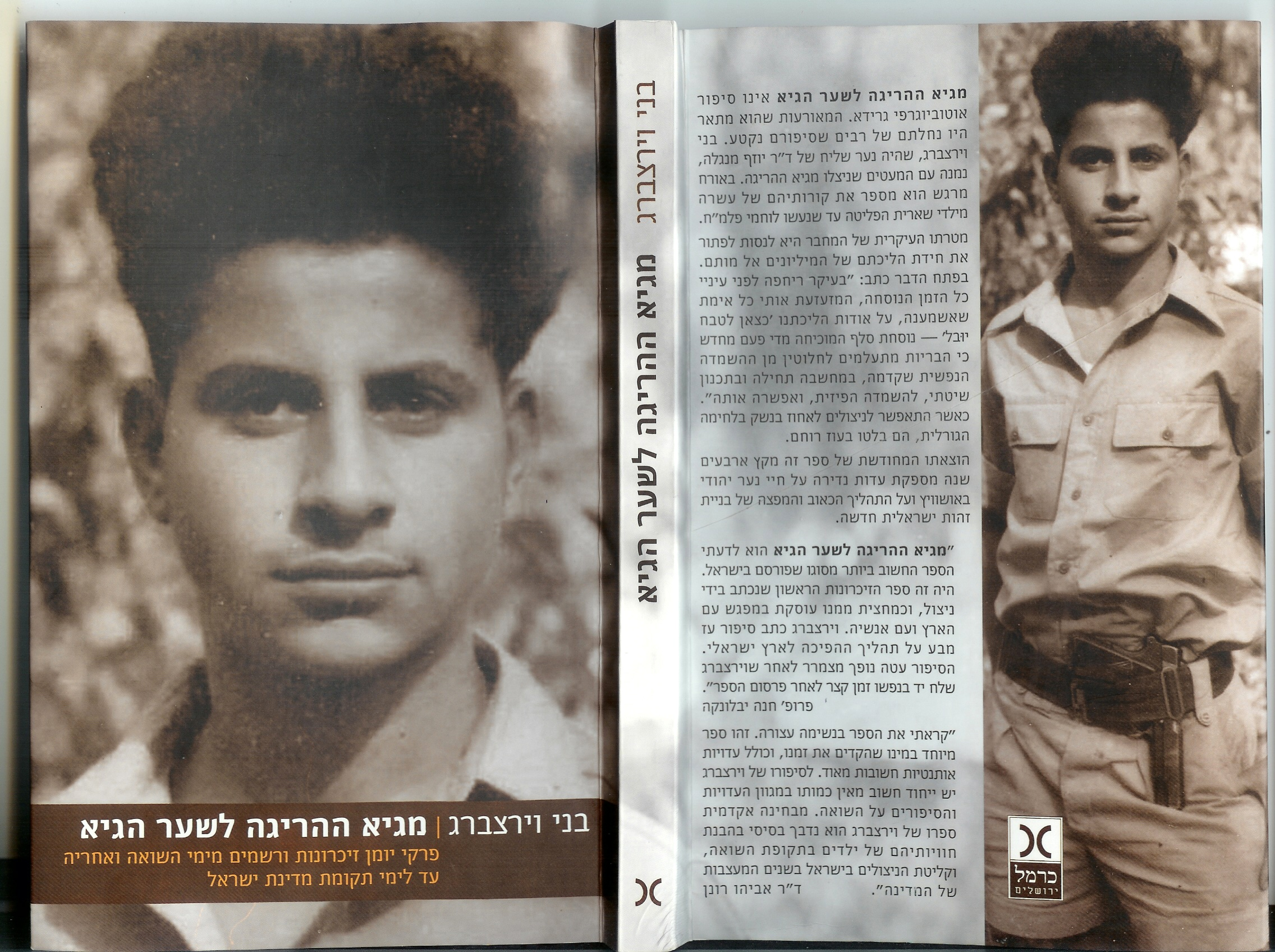 בני וירצברג ז"ל